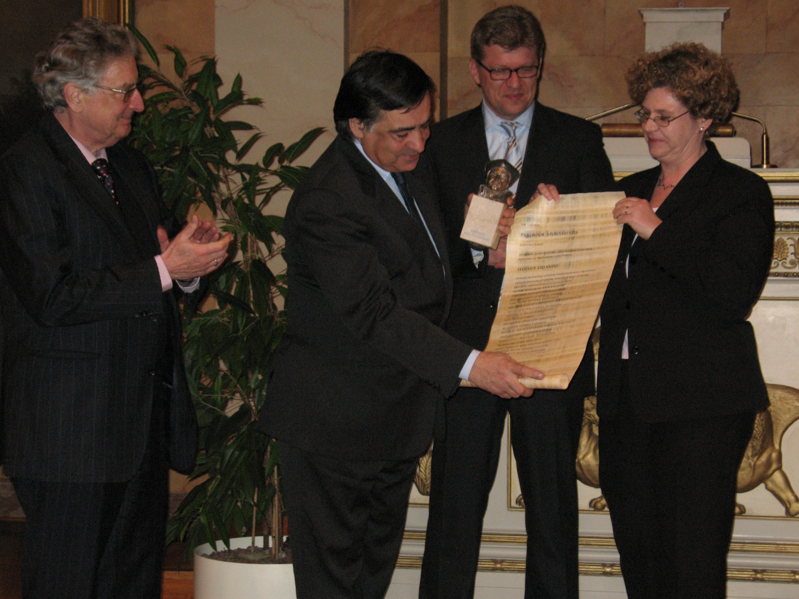 Von links: Gerhart Baum, Prof. Dr. Leoluca Orlando, Prof. Dr. Stefan Kipf und Heike Vollstedt, stellvertretende Vorsitzende des Deutschen Altphilologenverbandes, bei der Verleihung des Humanismus-Preises an Prof. Dr. Leoluca Orlando im Rahmen des Bundeskongresses des DAV 2008 in der alten Aula der Universität Göttingen.